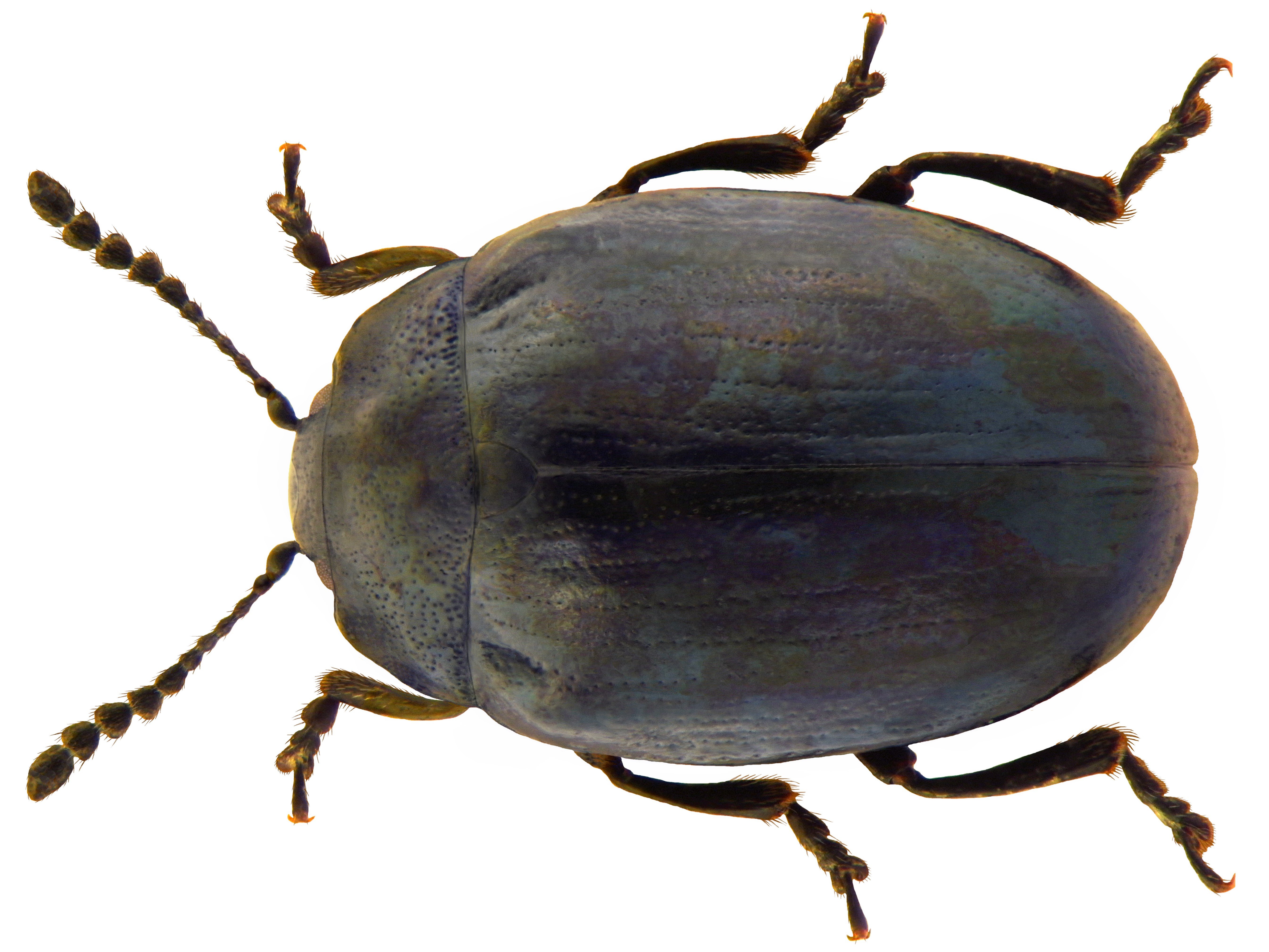 Phaedon armoraciae (Linné, 1758) Familie: Chrysomelidae Groesse: 3-4 mm Verbreitung: Europa Ökologie: auf Veronica beccabunga Fundort: Germania, Bayern, Oberfranken, Kulmbach leg.det. U.Schmidt, 1974 Foto: U.Schmidt, 2010